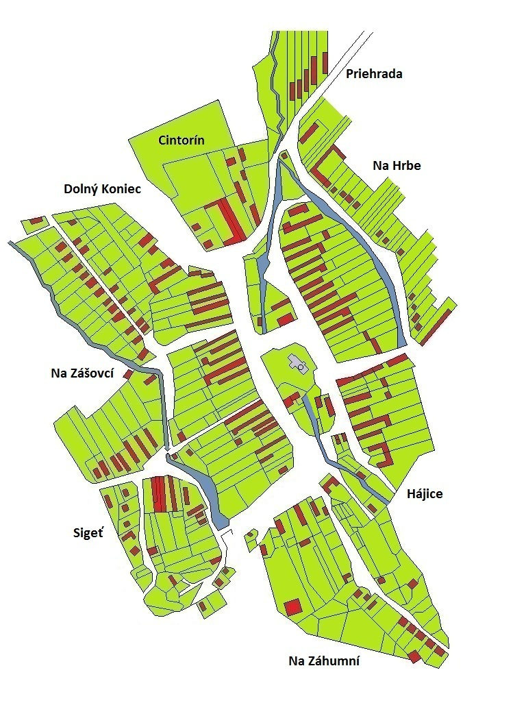 Mapa obce Horné Opatovce